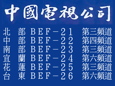 中國電視公司採用的Leitch DFS-3100N Still File靜畫儲存系統所使用的頻道表。本圖係依據《中華民國電視年鑑第七輯：民國七十九年至八十年》（中華民國電視學會1992年6月30日出版）第151頁所載原圖自行仿製。